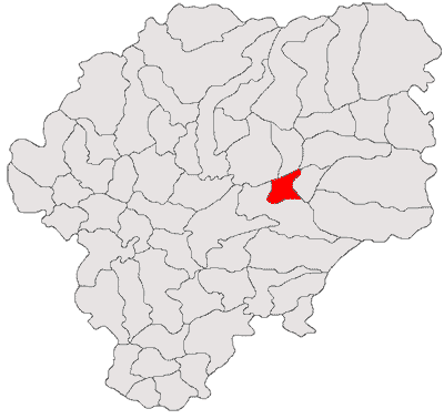 Categorie:Hărţi ale judeţului Bistriţa-Năsăud